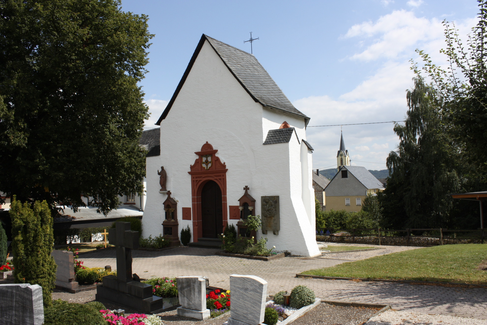 Chor der ehemligen Lösnicher Pfarrkiche von 1638. Heute Friedhofskapelle.